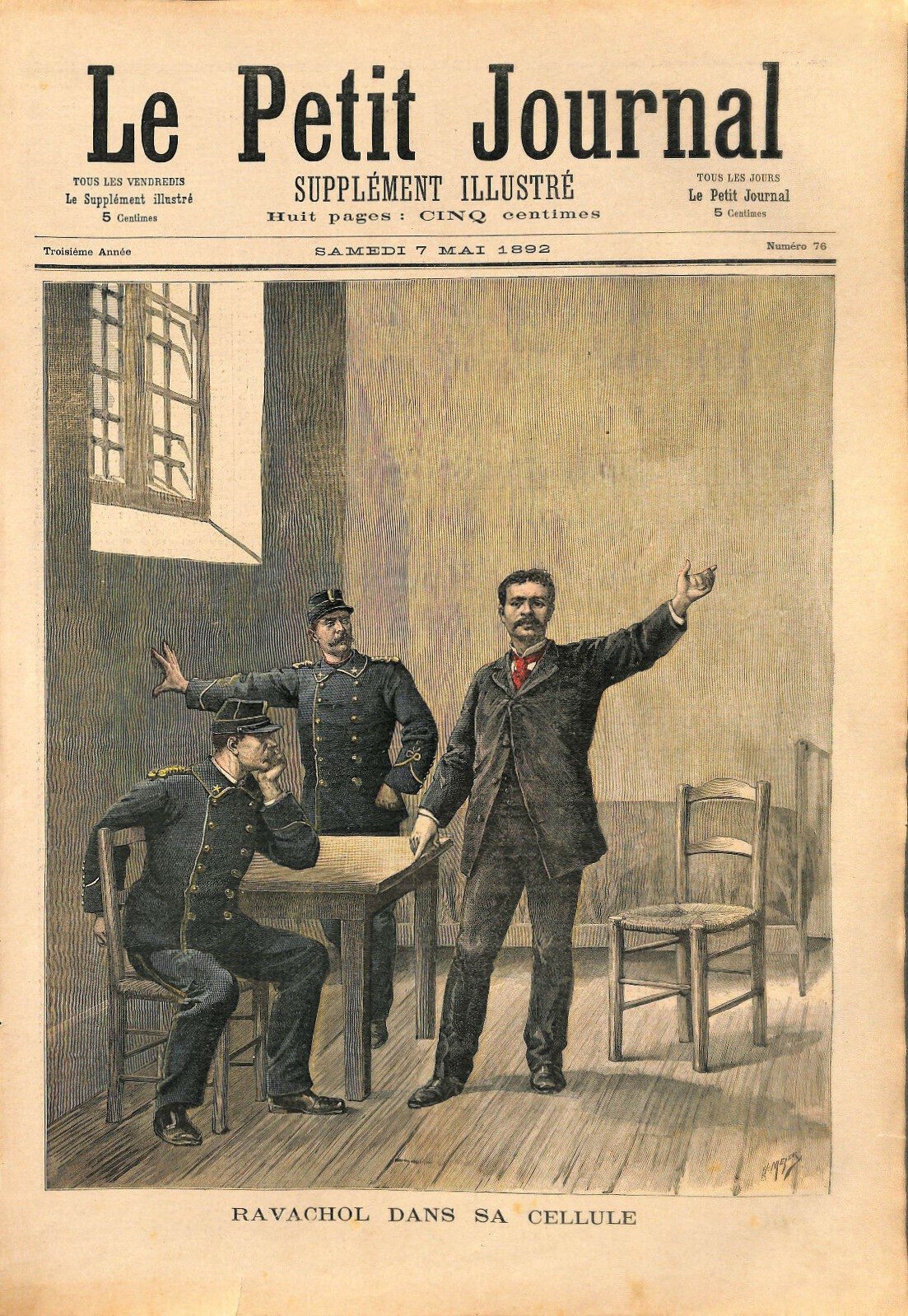 Desenho reconstituindo Ravachol em seu depoimento a polícia. Le Petit Journal.